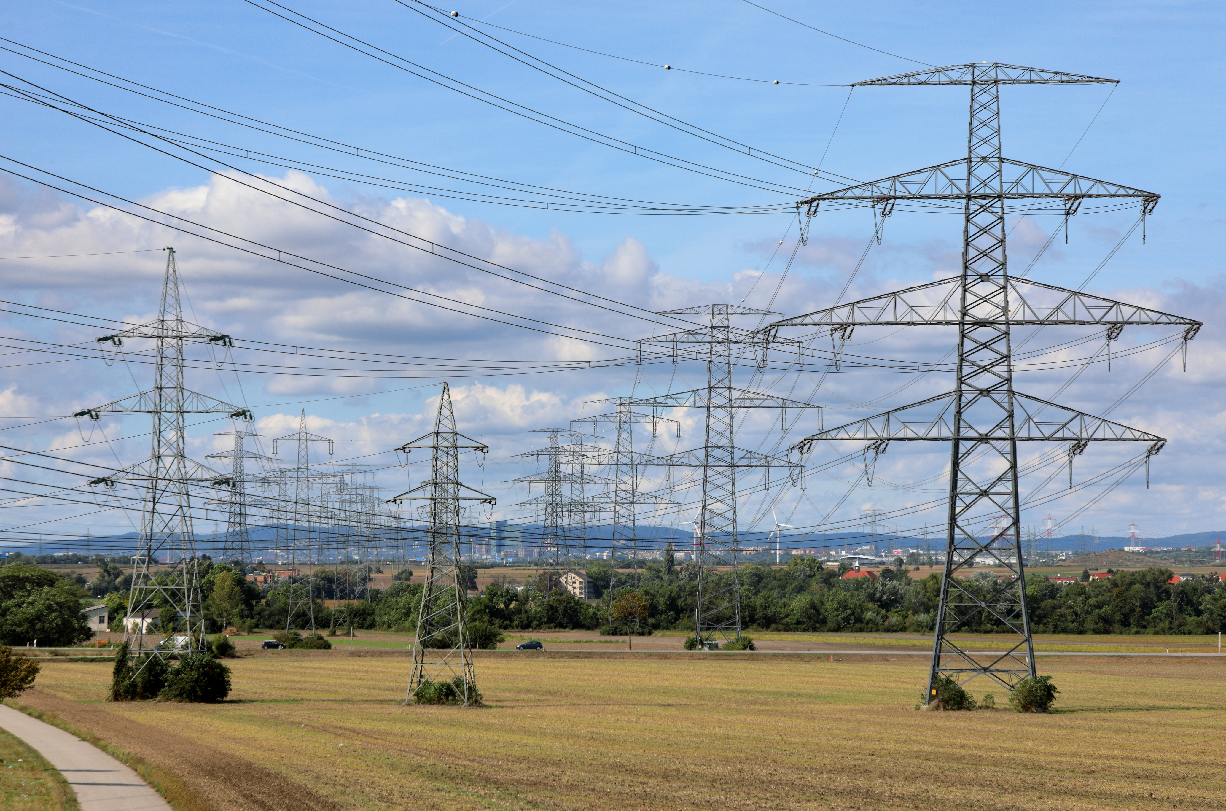 Hochspannungs-Freileitungstrasse in der niederösterreichischen Marktgemeinde Himberg bzw. zwischen den Dörfern Himberg und Pellendorf mit Blickrichtung Nordwest.Die zwei größeren Freileitungen, eine 4-kreisige 380-kV-Leitung mit Bündelleiter und zwei Erdseilen, von Sarasdorf kommend und Teil des 380-kV-Hochspannungsringes, sowie eine 2-kreisige 220-kV-Leitung, führen zum größten Umspannwerk Wiens, dem Umspannwerk Wien-Südost. Die kleinere, eine 2-kreisige 110-kV-Leitung (einphasig) gehört zum Stromnetz der ÖBB und führt zum Umformerwerk Kledering sowie zum Unterwerk Simmering. Die vordersten Freileitungsmasten sind als Abspannmasten ausgeführt.